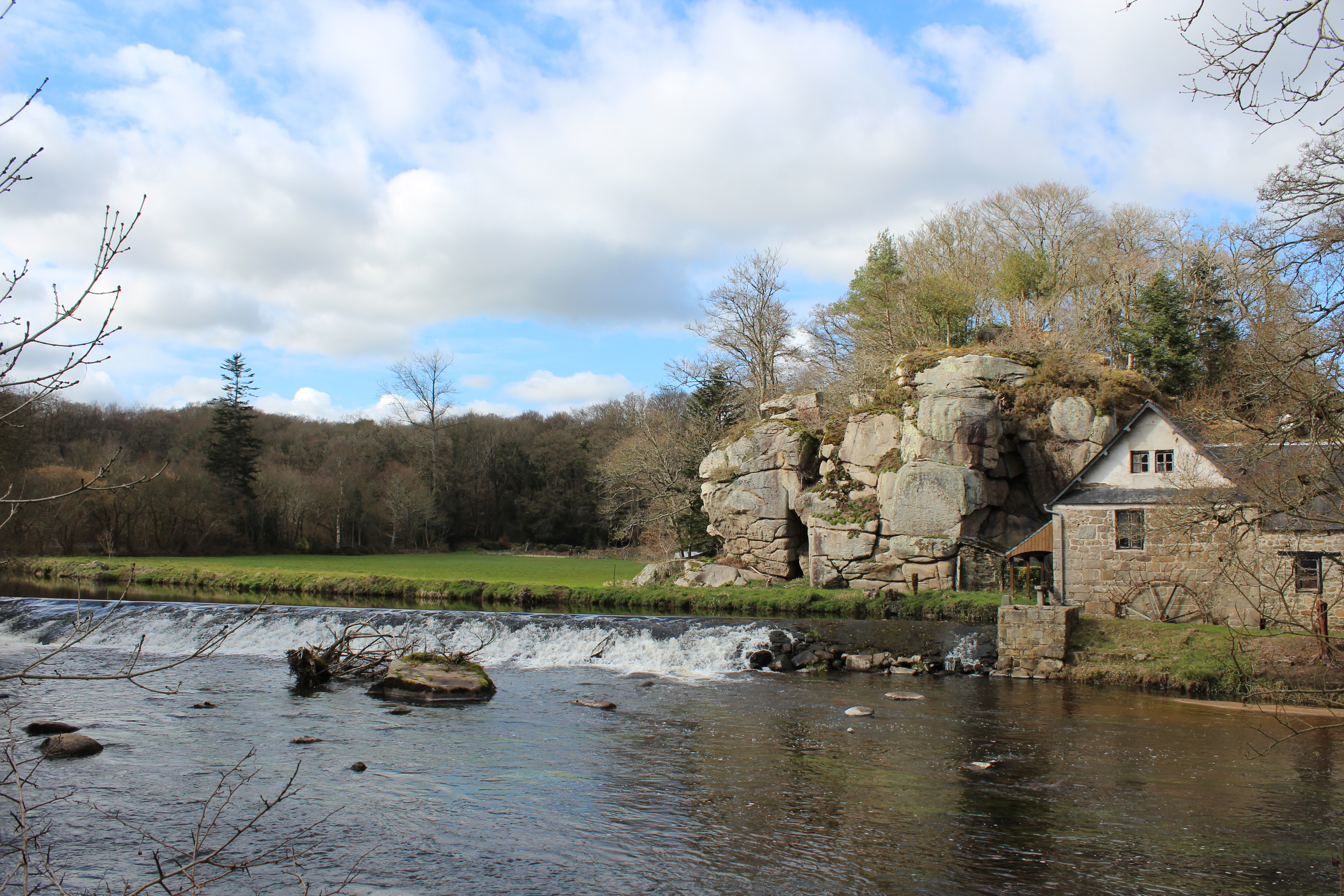 Moulin du Losser sur les rives du Léguer. (Mars 2012)